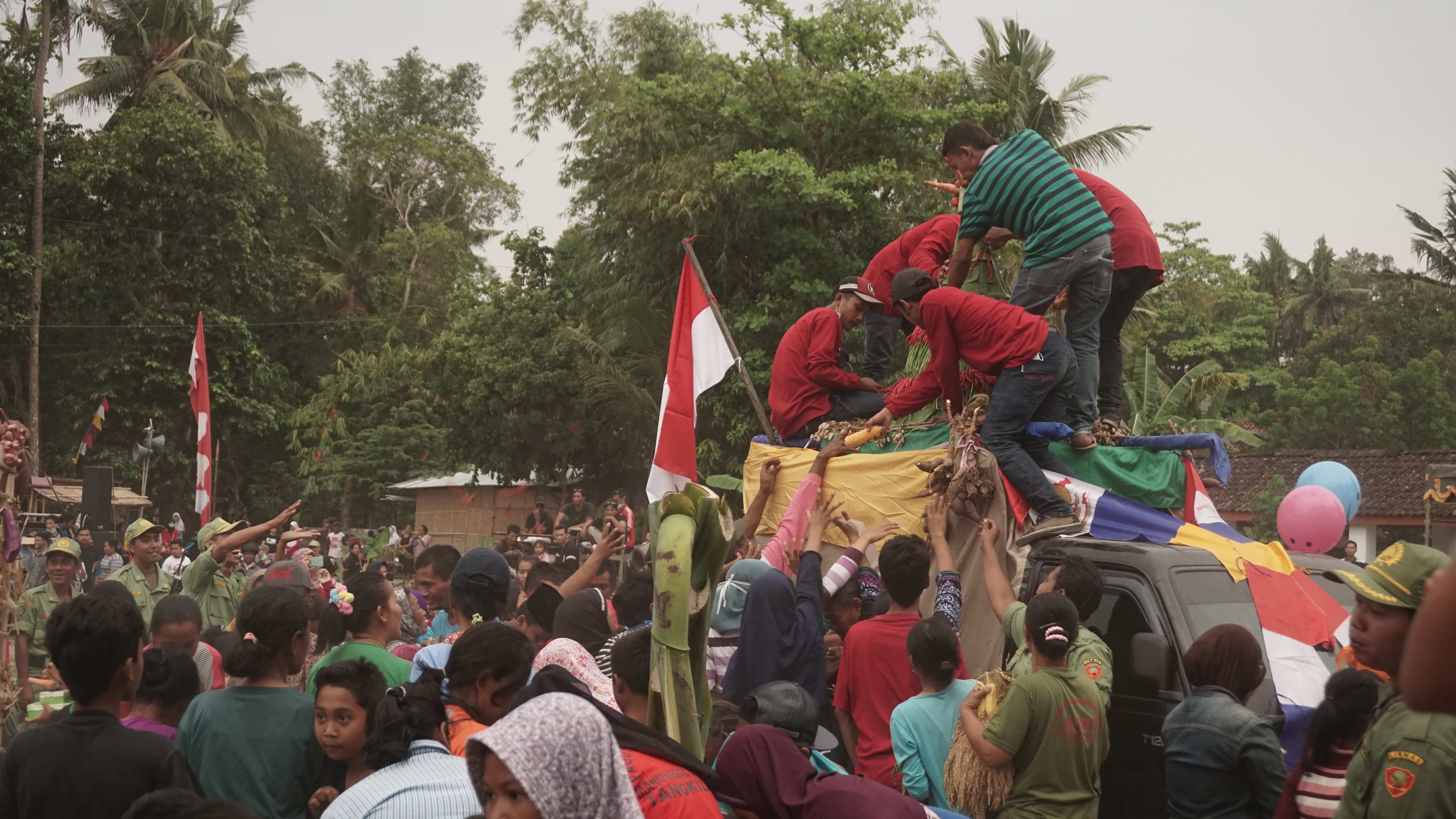 Gunungan, berisi berbagai hasil bumi sebagai simbol kemakmuran diperebutkan warga ketika sudah sampai di titik akhir lokasi kirab budaya desa Sumbermulyo pada Oktober 2017